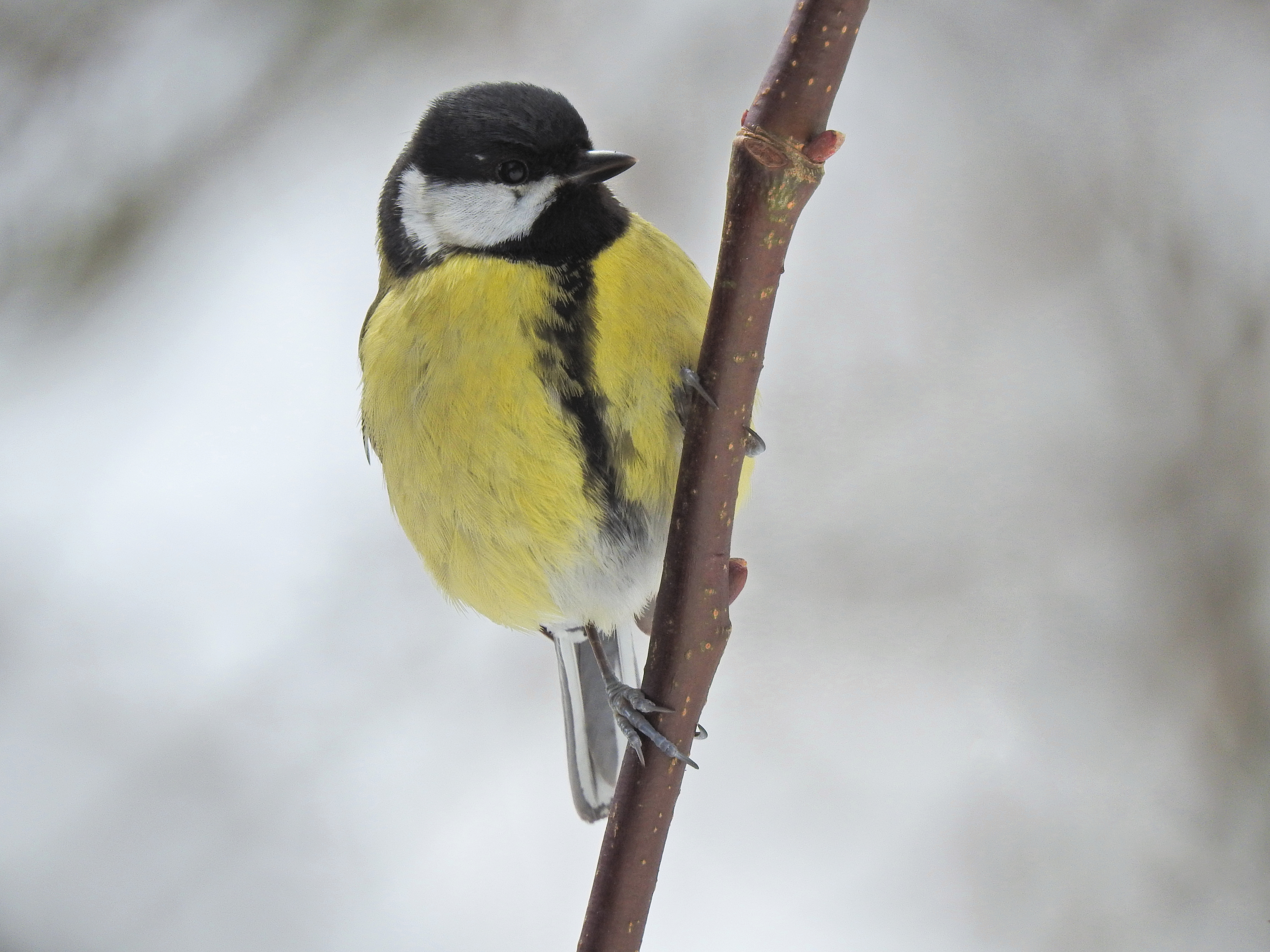 great tit Kohlmeise piţigoi mare